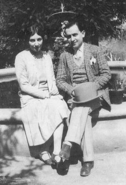 El critico literario Guillermo de Torre y su esposa, la pintora Norah Borges en 1928